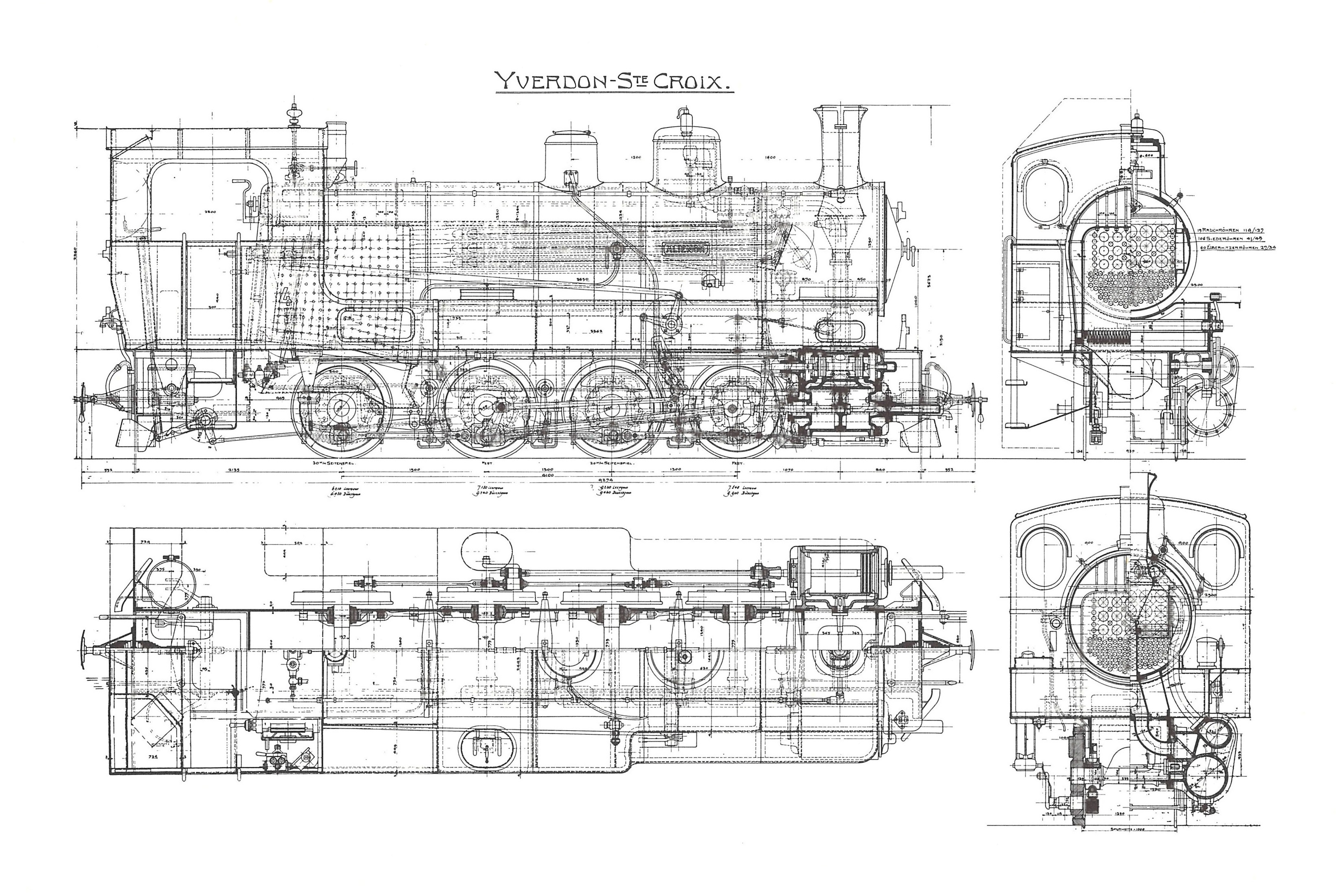 Originalzeichnung der Meterspur 2 Zylinder Heissdampf-Tenderlokomotive G 4/4 4 Aliénor der Yverdon–Ste-Croix-Bahn (YSteC) in der Schweiz. Gebaut in der Schweizerischen Lokomotiv- und Maschinenfabrik (SLM) in Winterthur.